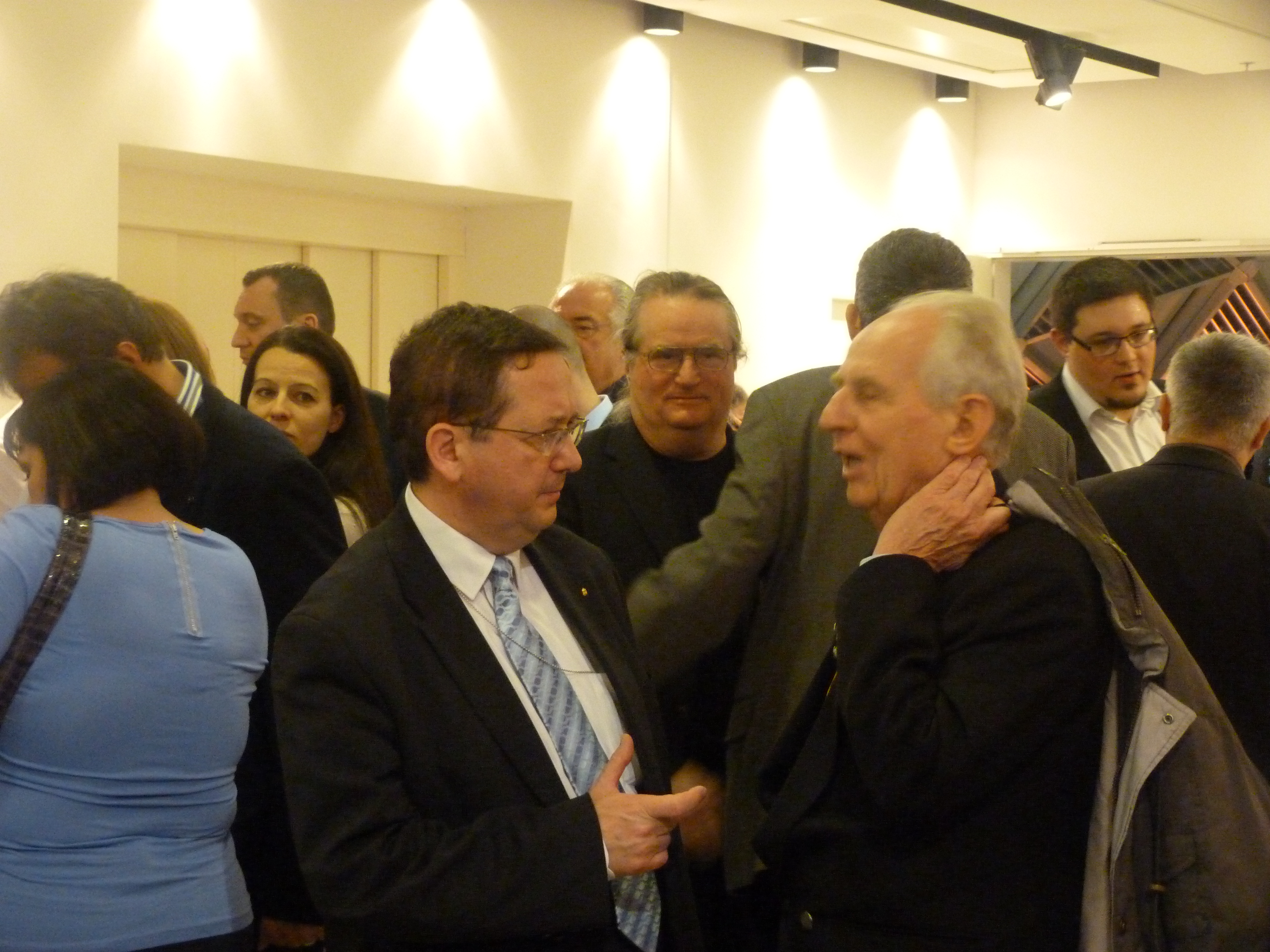 A felvétel 2014. április 6 –án, vasárnap készült Budapesten, a Bálna előtt és a Bálna Eredményváró. (1-51). Ezen a napon tartották Magyarországon az országgyűlési képviselőválasztást. A Bálna előtt gyülekezők az eredményt várták. Az ott felállított pódiumon köszönte meg a választók bizalmát Orbán Viktor. Lévai Anikó, Tőkés László, Jókai Anna, Martonyi János, Bába Iván, Szász Jenő, Gálné Pelcz Ildikó, Illés Zoltán, Andy Vajna, Bayer Zsolt, Pataky Attila, Vidnyánszky Attila, Sára Sándor. A választáson a FIDESZ-KDNP pártszövetség 2010 után újra kétharmados többséget szerzett a választáson. Képviselői helyek: FIDESZ-KDNP : 133, MSZP–Együtt–DK– PM–MLP: 38, Jobbik: 23, LMP: 5 képviselői hely. Az országos listákra leadott szavazatok száma: Fidesz–KDNP 2 264 730, MSZP–Együtt– DK–PM–MLP: 1 290 804, Jobbik 1 020 476, LMP: 269 413. Forrás: FIDESZ-KDNP: újra kétharmad hozzáférés: 2014.04.14 ©© Derzsi Elekes Andor, Budapest, 2014, A kép és filmfelvételek egészben, vagy részletekben másolását, bármilyen úton történő sokszorosítását és felhasználását a szerző ellenérték nélkül, jogutódjaira is kihatóan megengedi. Az engedély kiterjed a kereskedelmi célú hasznosításra is. Kéri azonban nevének feltüntetését a felhasználás során. A Metapolisz sorozat valamennyi képe és filmje Creative Commons alatti valamint kereskedelmi - for profit - célra is felhasználható. Ajánlott hivatkozás: Derzsi Elekes Andor: Metapolisz DVD line